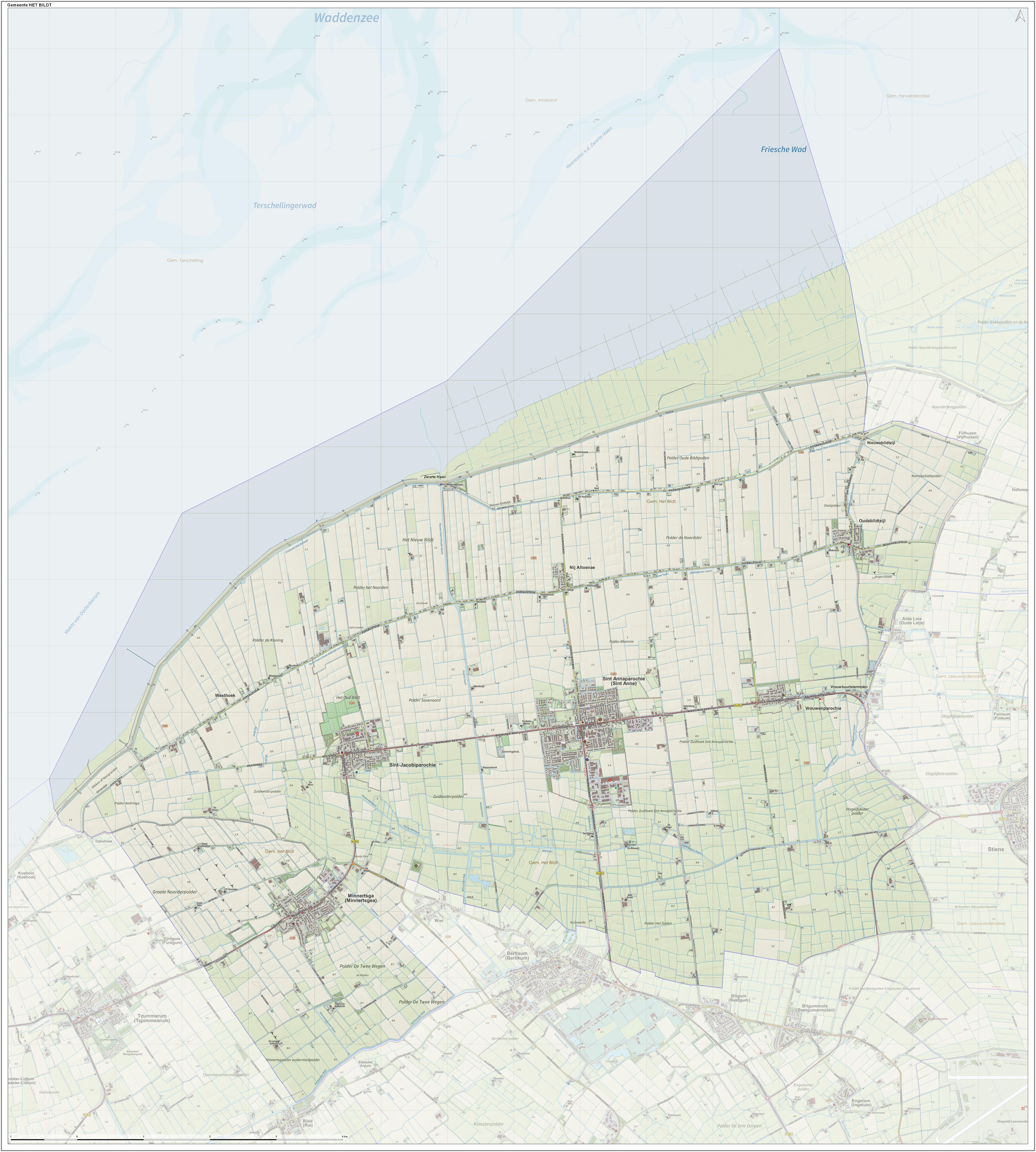 Topografische gemeentekaart. Resolutie: 400 pixels/km. Kaartbeeld samengesteld uit de open geodata van de Top10NL en Top25namen (Kadaster), Creative Commons-BY licentie. Gebouwvlakken uit open geodata BAG extract. Wegen uit de OpenStreetMap, OpenStreetMap community. Reliëfschaduw uit de Actuele Hoogtekaart AHN2. Samenstelling en kleurenschema: Jan-Willem van Aalst, met QGIS. Zie ook de Legenda.